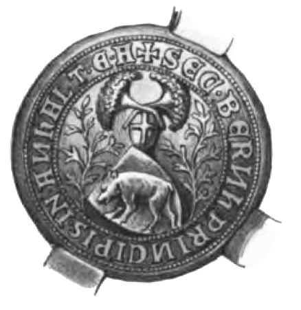 Siegel des Fürsten Bernhard IV. von Anhalt-Bernburg: Secret (Original veröffentlicht im Codex diplomaticus anhaltinus, Band 3)